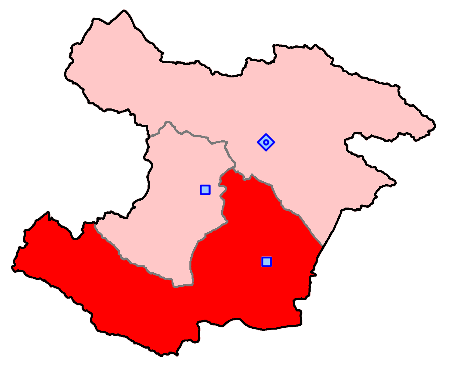 حوزهٔ انتخاباتی بوئین‌زهرا و آوج برای انتخابات مجلس شورای اسلامی